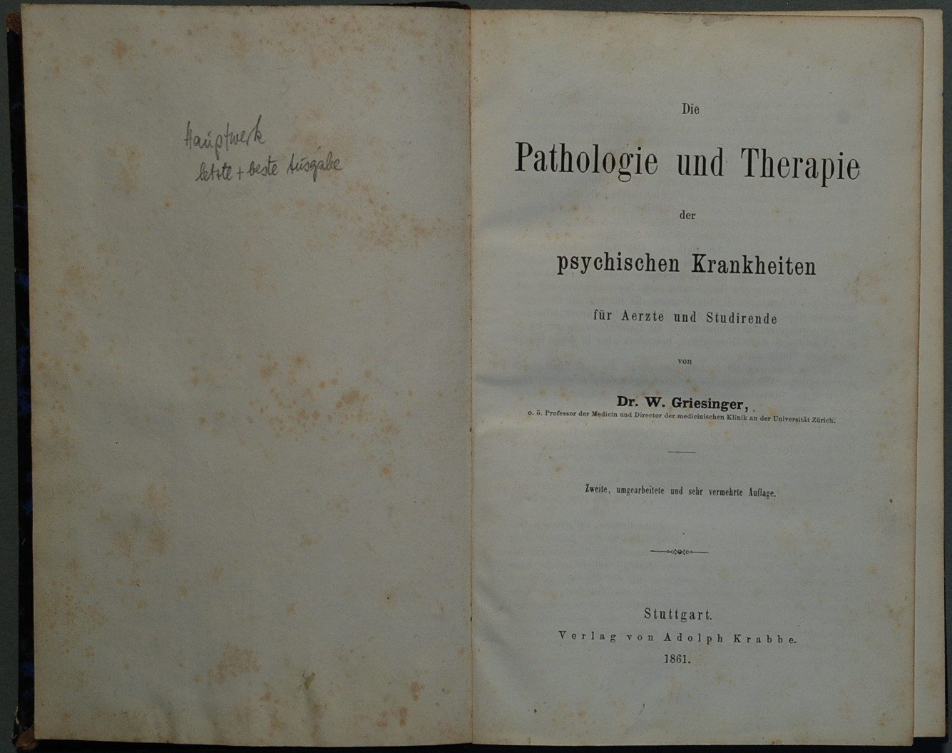 Griesinger, Wilhelm: Die Pathologie und Therapie der psychischen Krankheiten für Aerzte und Studirende. Zweite, umgearbeitete und sehr vermehrte Auflage. Stuttgart: A. Krabbe 1861, 538 Seiten Wilhelm Griesinger (1817 - 1868)war 1847 - 1849 Professor in Tübingen, 1850 in Kiel, ab 1854 Direktor der Medizinischen Klinik in Tübingen und ab 1864 Leiter der psychiatrischen Abteilung der Charite zu Berlin. Als "Somatiker" forderte Griesinger "in den psychischen Krankheiten jedesmal Erkrankungen des Gehirns zu erkennen" (S. 1). Mit der zweiten, grundlegend überarbeiteten Auflage seines Lehrbuches von 1861 wurde nach Pinel und Esquirol für etwa 100 Jahre die deutschsprachige Psychiatrie führend: Griesinger → Wernicke → Kahlbaum → Kraepelin → E. Bleuler → Jaspers → K. Schneider.